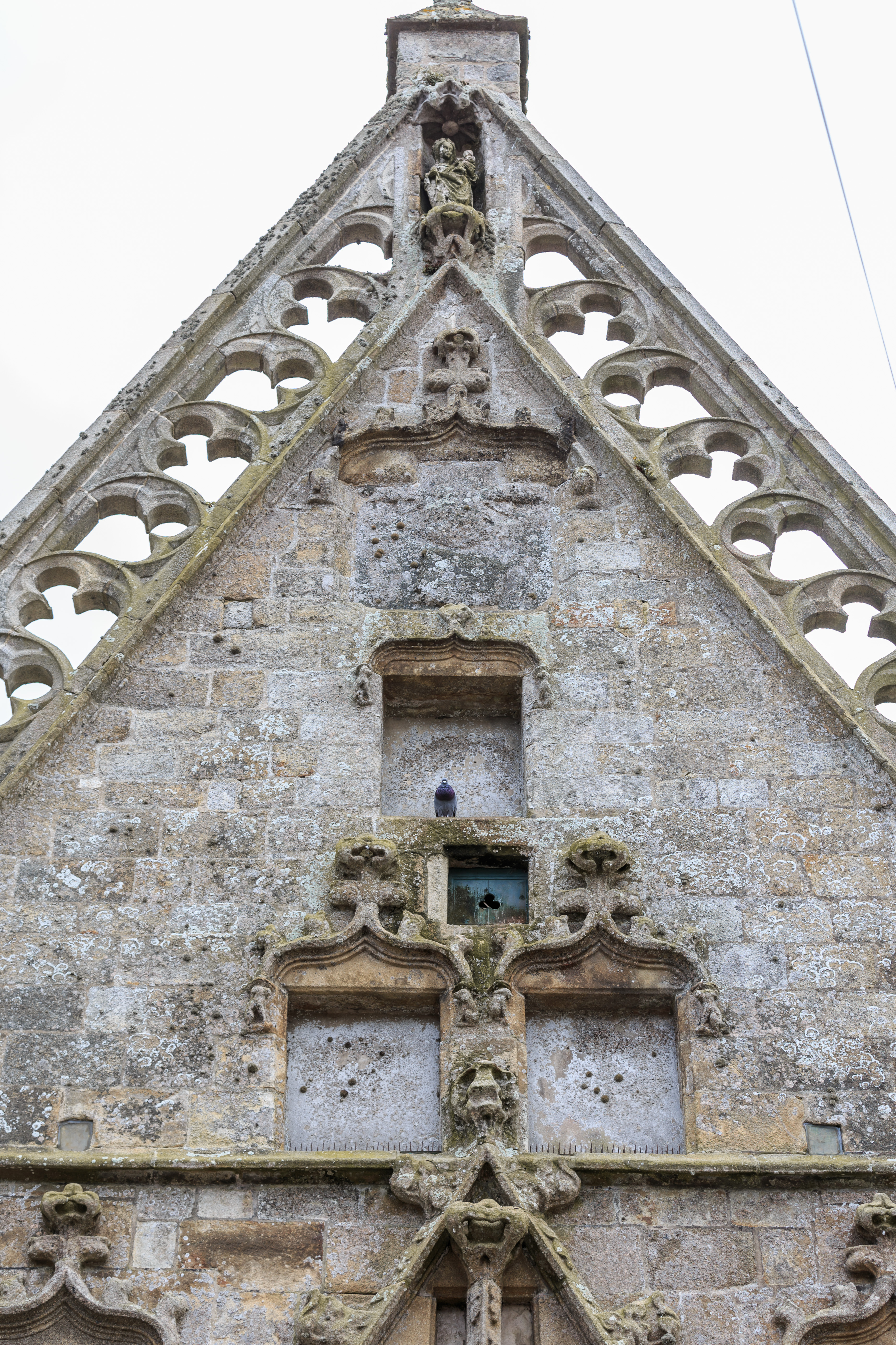 Détails des sculptures du porche Nord de la chapelle Notre-Dame du Kreisker à Saint-Pol-de-Léon (Finistère, Bretagne).